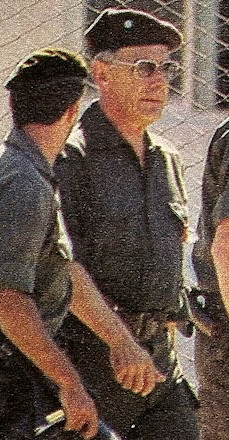 El Teniente General Martín Bonnet supervisando la represión al último alzamiento militar de los Carapintadas el 3 de diciembre de 1990.